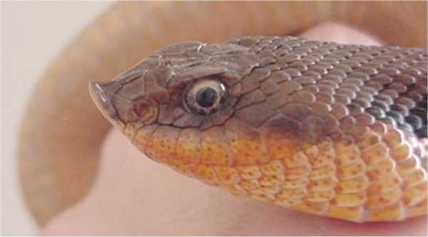 Heterodon platyrhinos